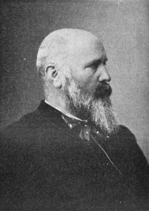 Max Meckel